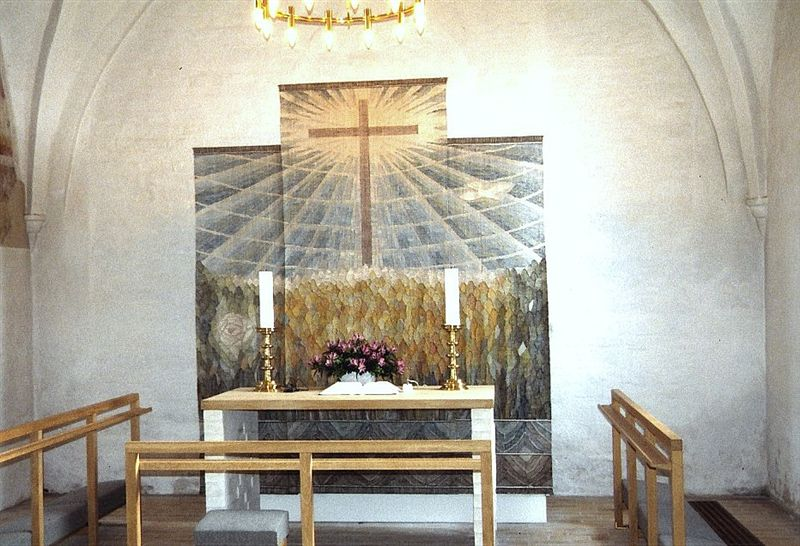 Gundsømagle Kirke i Danmark. Kor og alter med billedtæppe af Berit Hjelholt